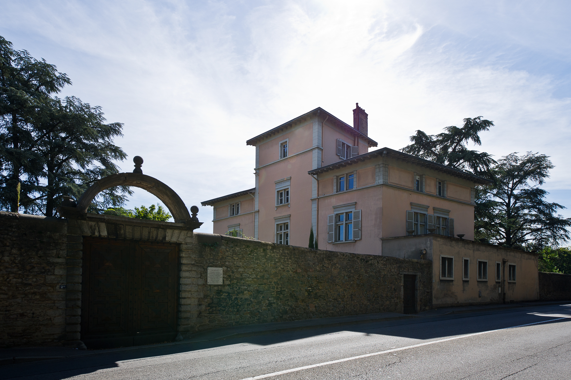 Maison d'Anthouard, 2 route de Champagne (Inscrit, 1975) .